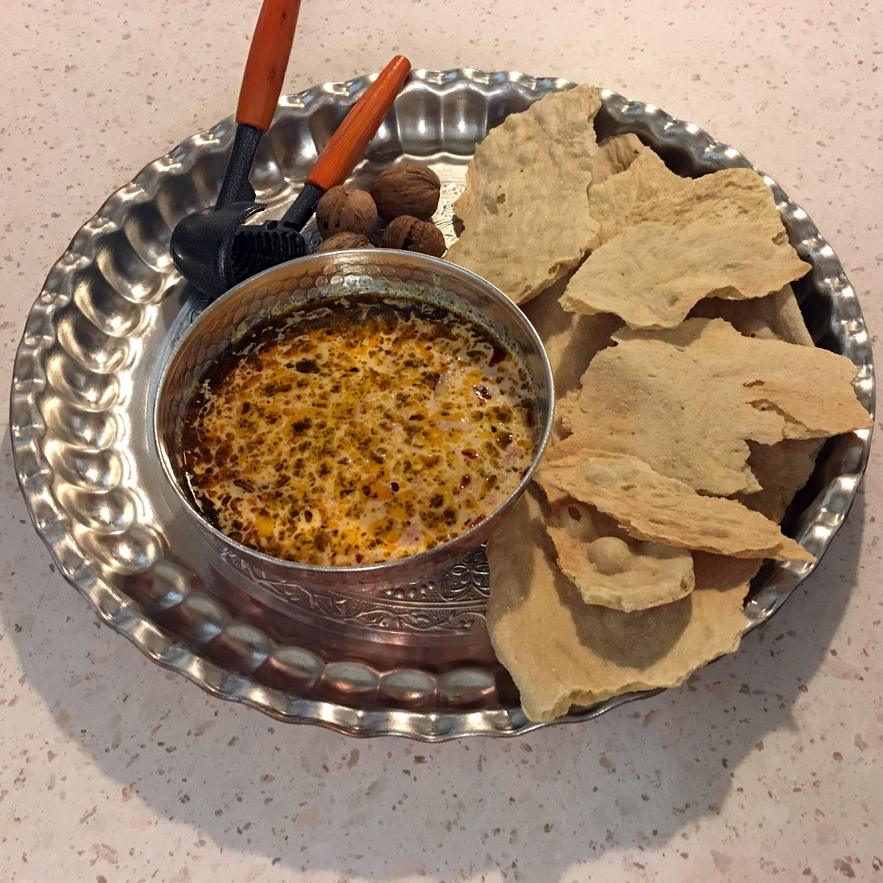 کمه جوش به همراه نان کاک و گردو